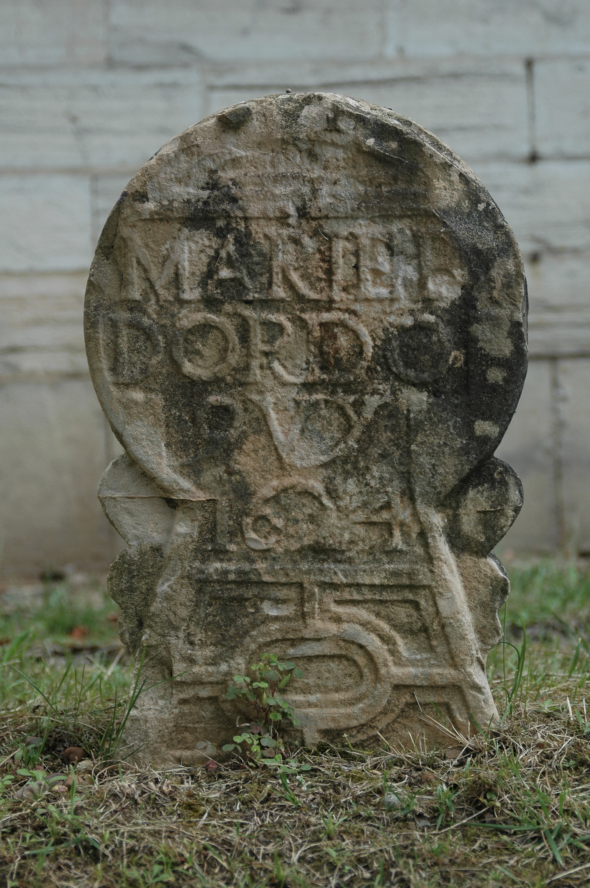 Larressore, stèle discoïdale. Photo prise le 08/08/06 par Harrieta171